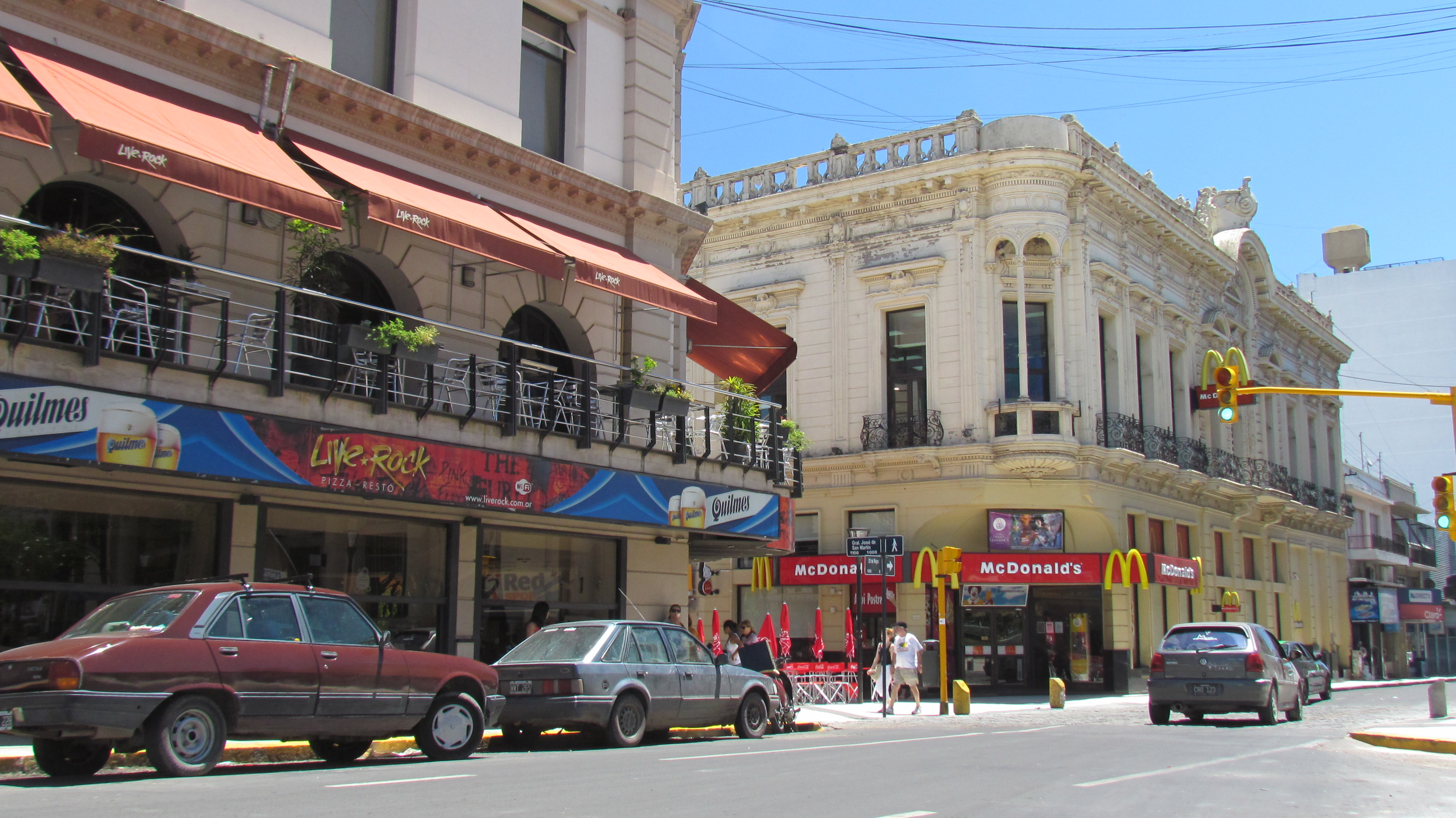 esquina posta